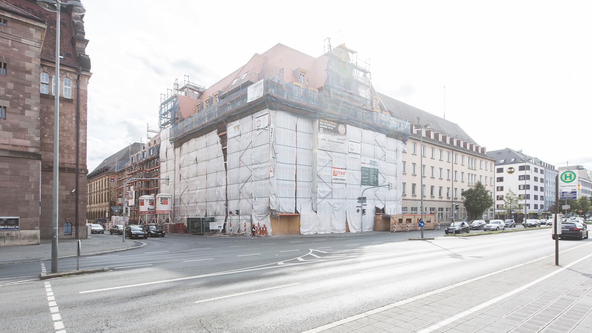 Nürnberg, Deutscher Hof im Umbau.